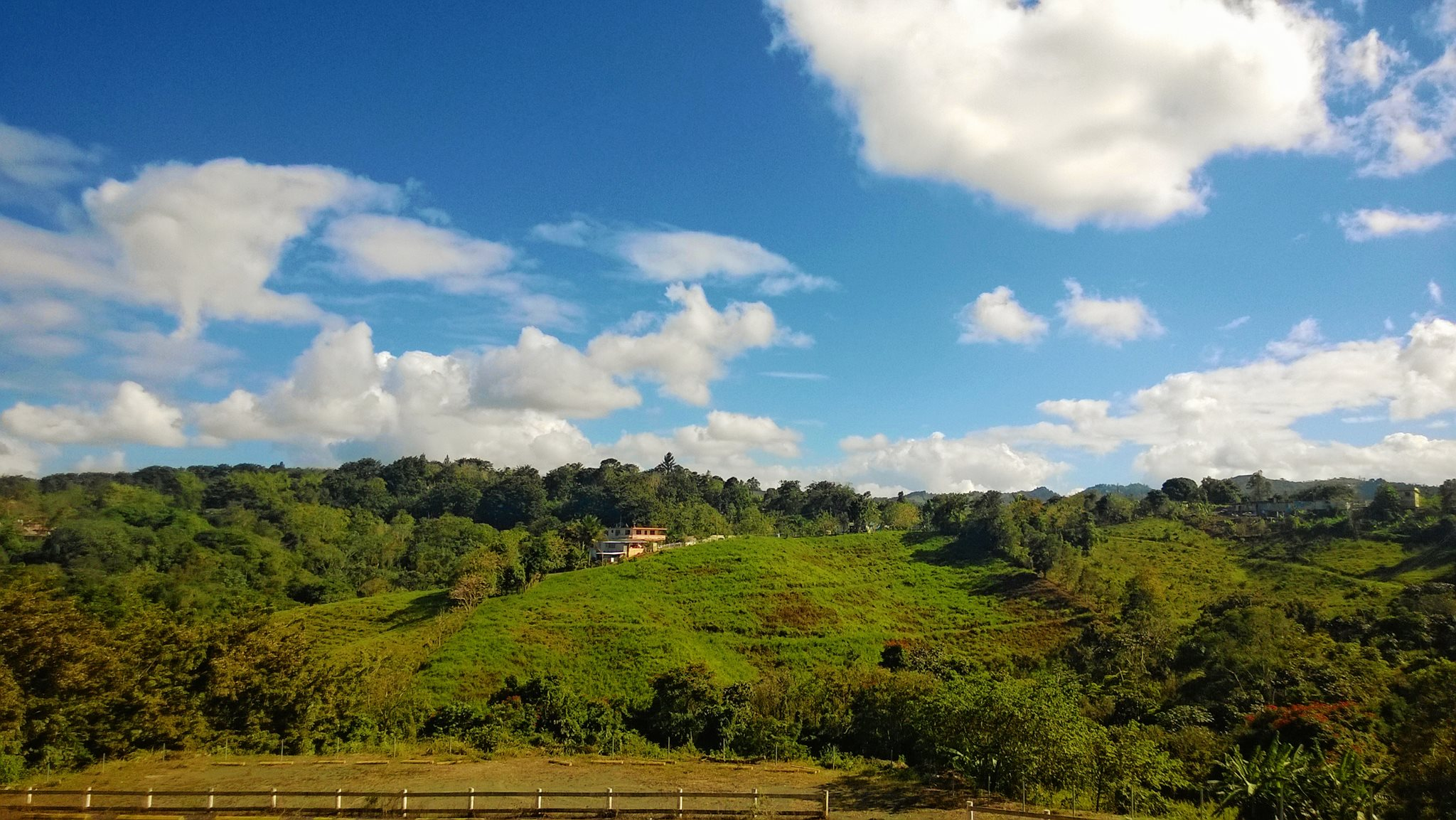 Barrio Cuchillas, Corozal, Puerto Rico (2014)